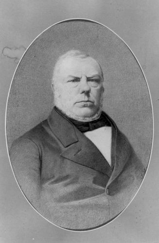 Ipe Anne Hooites (1812-1891) burgemeester van Hoogezand